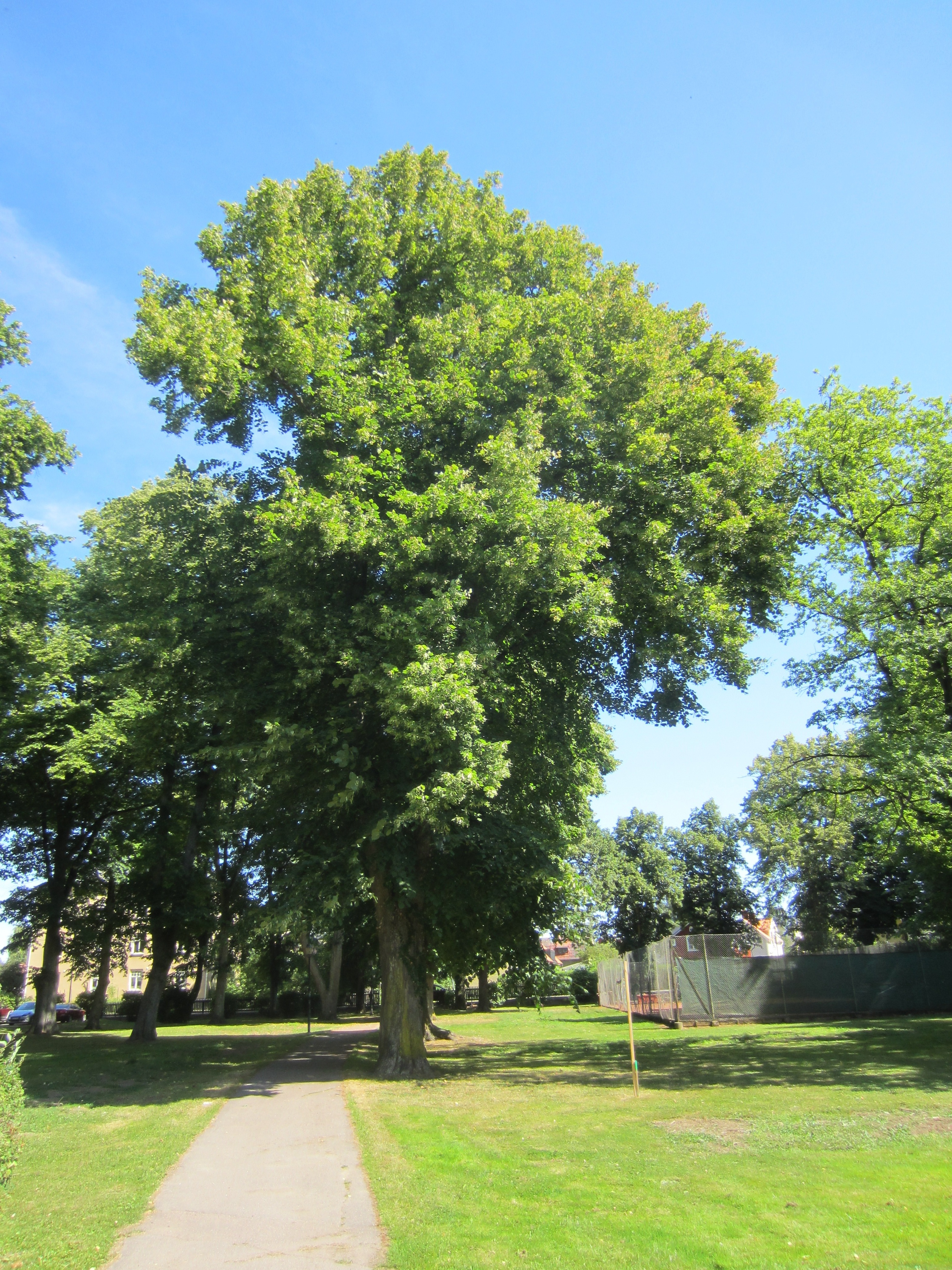 Gång- och cykelväg i Slottsträdgården, Vadstena, augusti 2013.